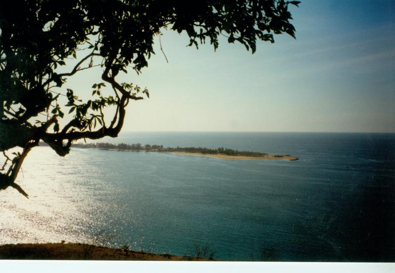 Restinga peninsula of Lobito, Angola